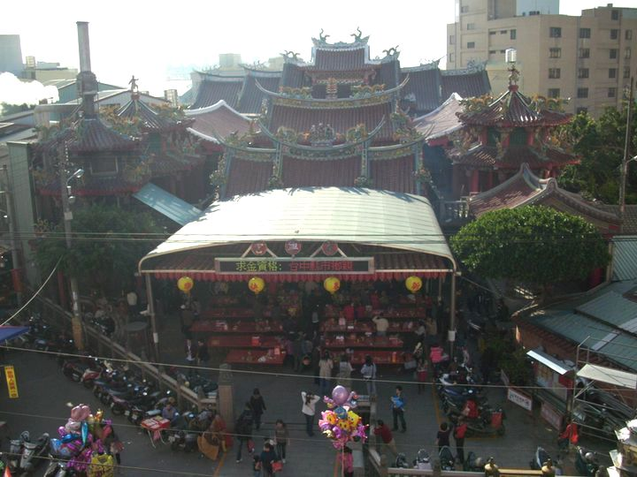 Yonĝing Temple, Daya District, Taichung.中文（台灣）: 位在台中市大雅區永興宮。